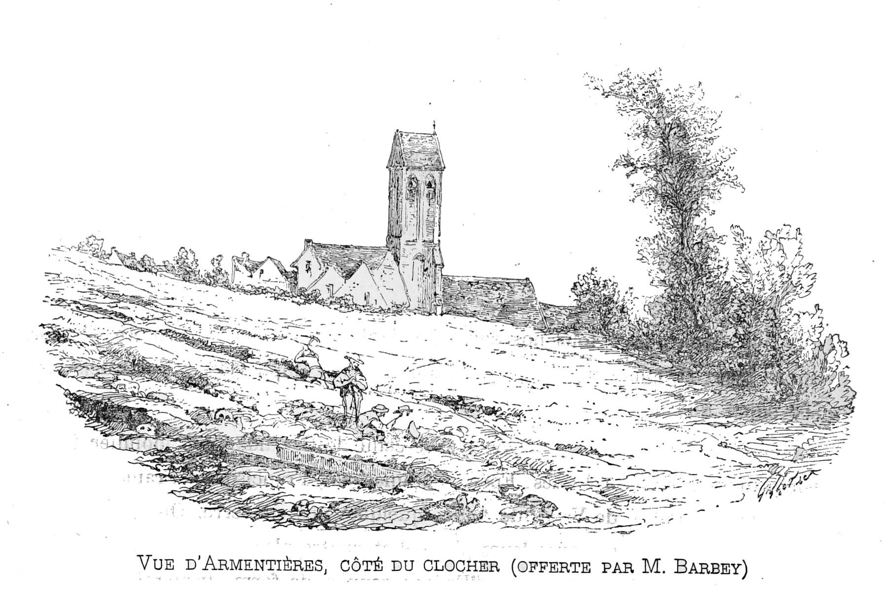 Armentières-sur-Ourcq (Aisne), sur un dessin de Pilloy.